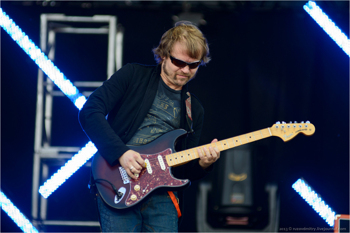 Андрей Звонков, группа "Би-2, фестиваль "Рок над Волгой" 2013